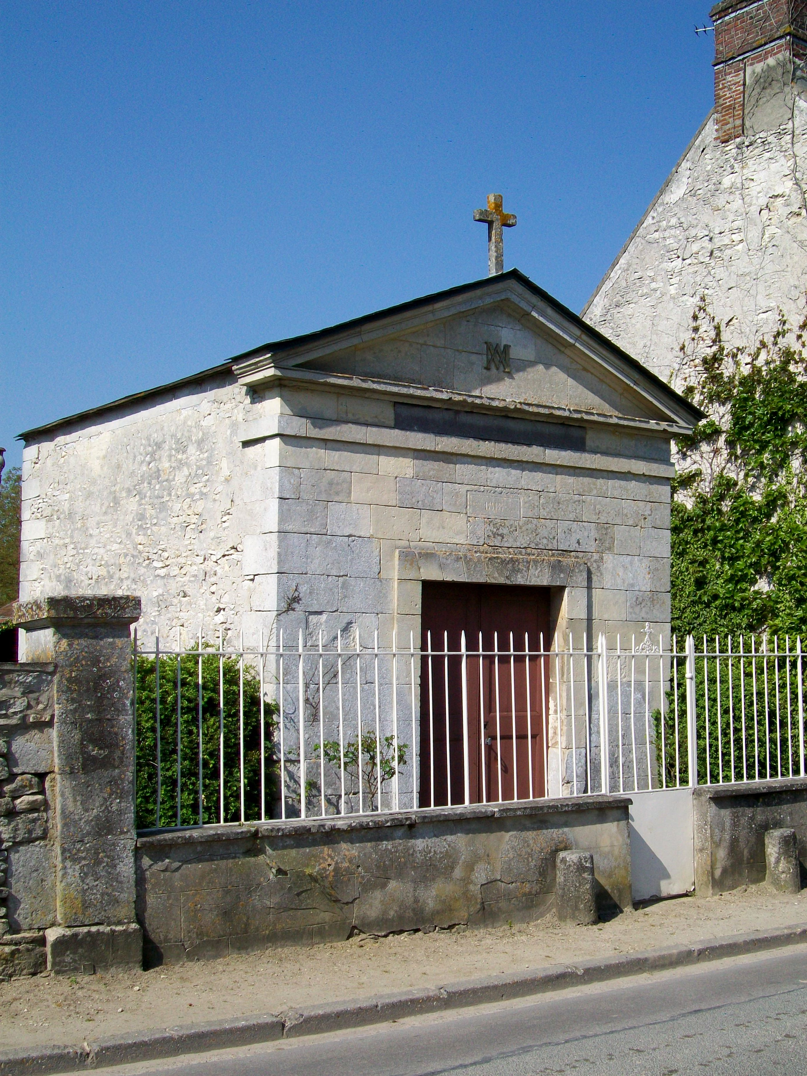 Le caveau du maire Fredin, sur la Grande rue. Suite à un différend qui l'avait opposé au duc de Valmy, le cimetière avait été déplace sur l'instigation de ce dernier, et contre l'avis du maire.